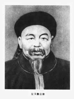 左文襄公像, Zuo Zongtang